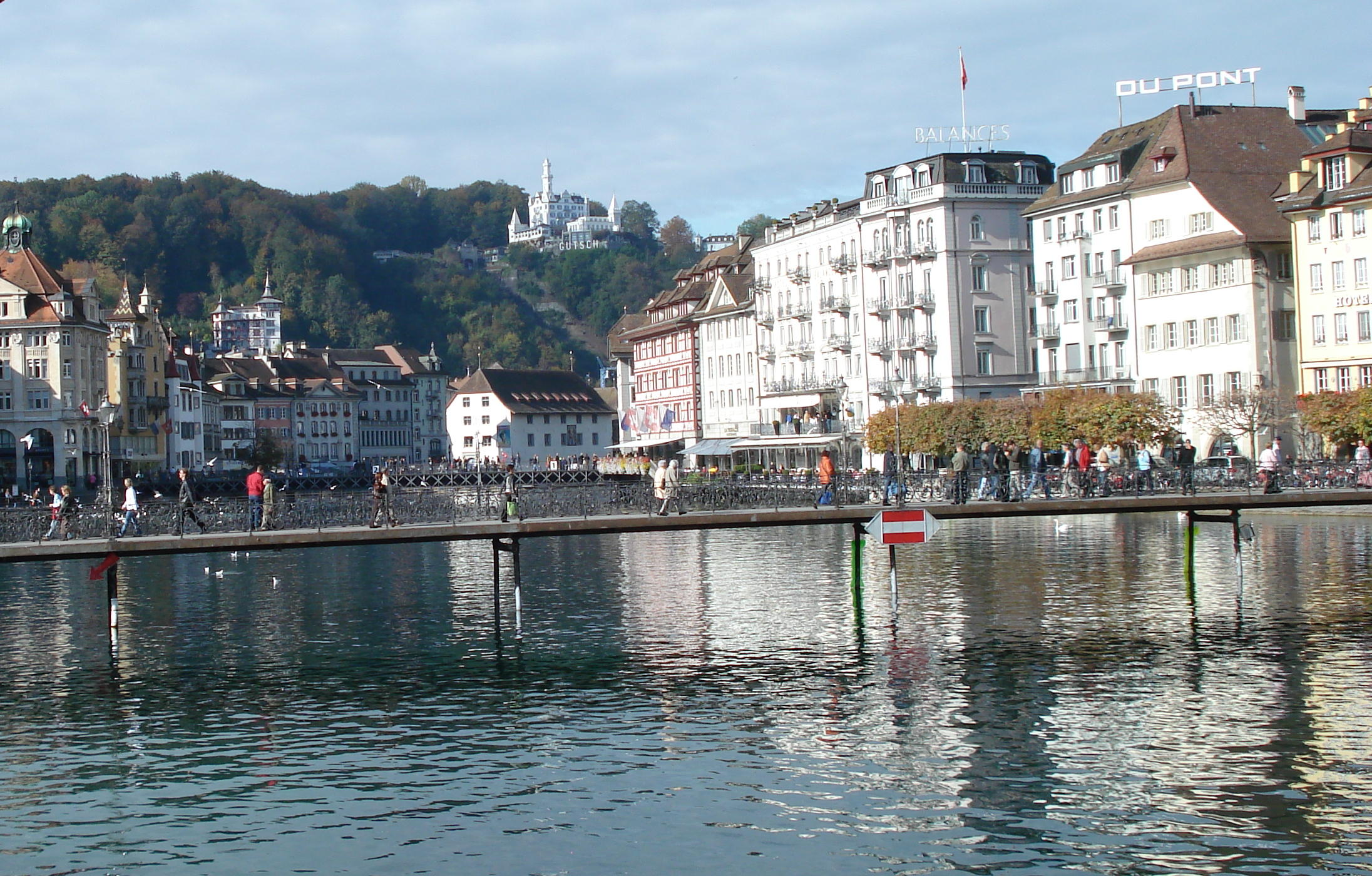 Luzern: Rathaussteg